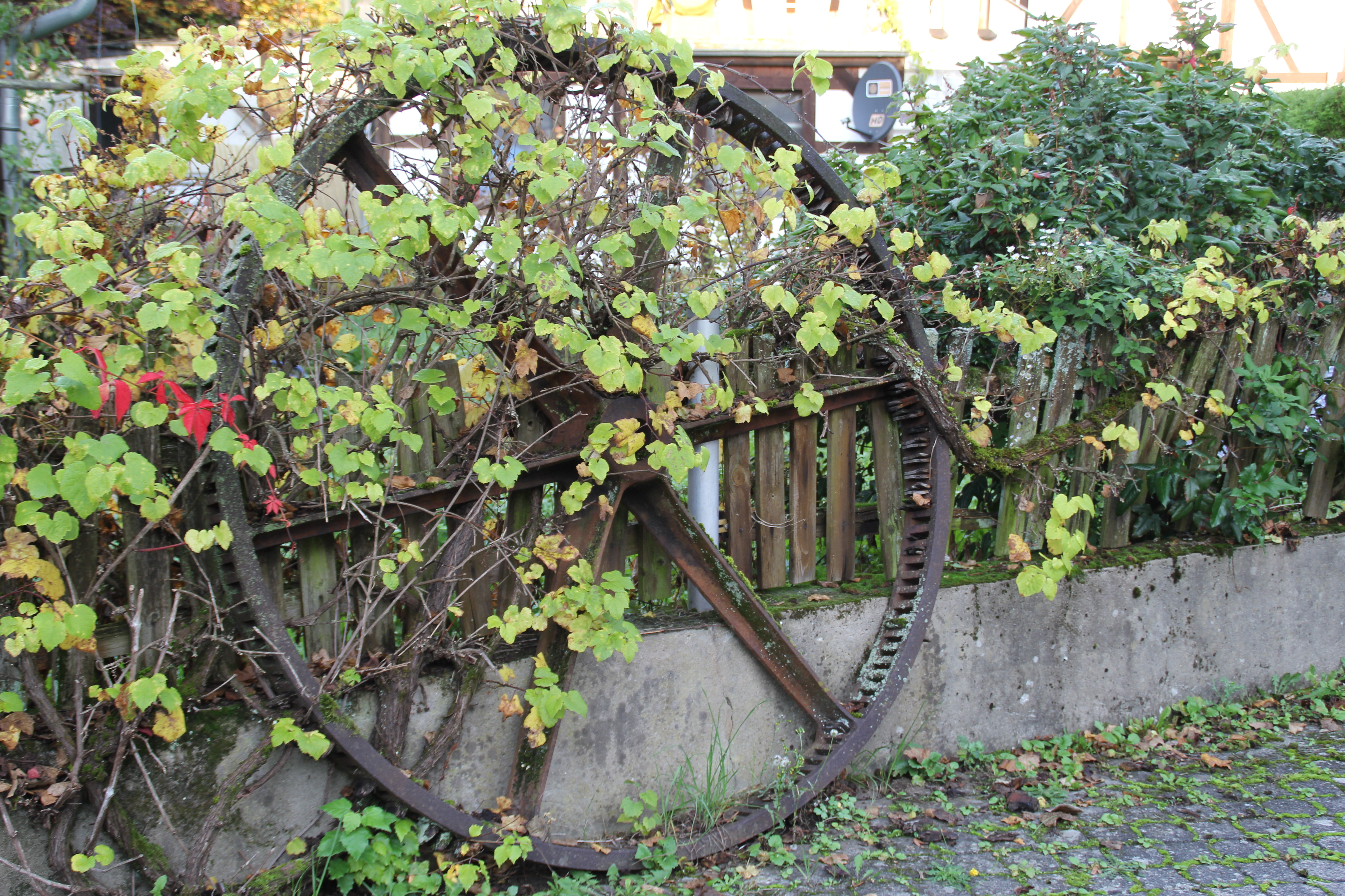 Das Königsrad der ehem. Obermühle in Mömbris